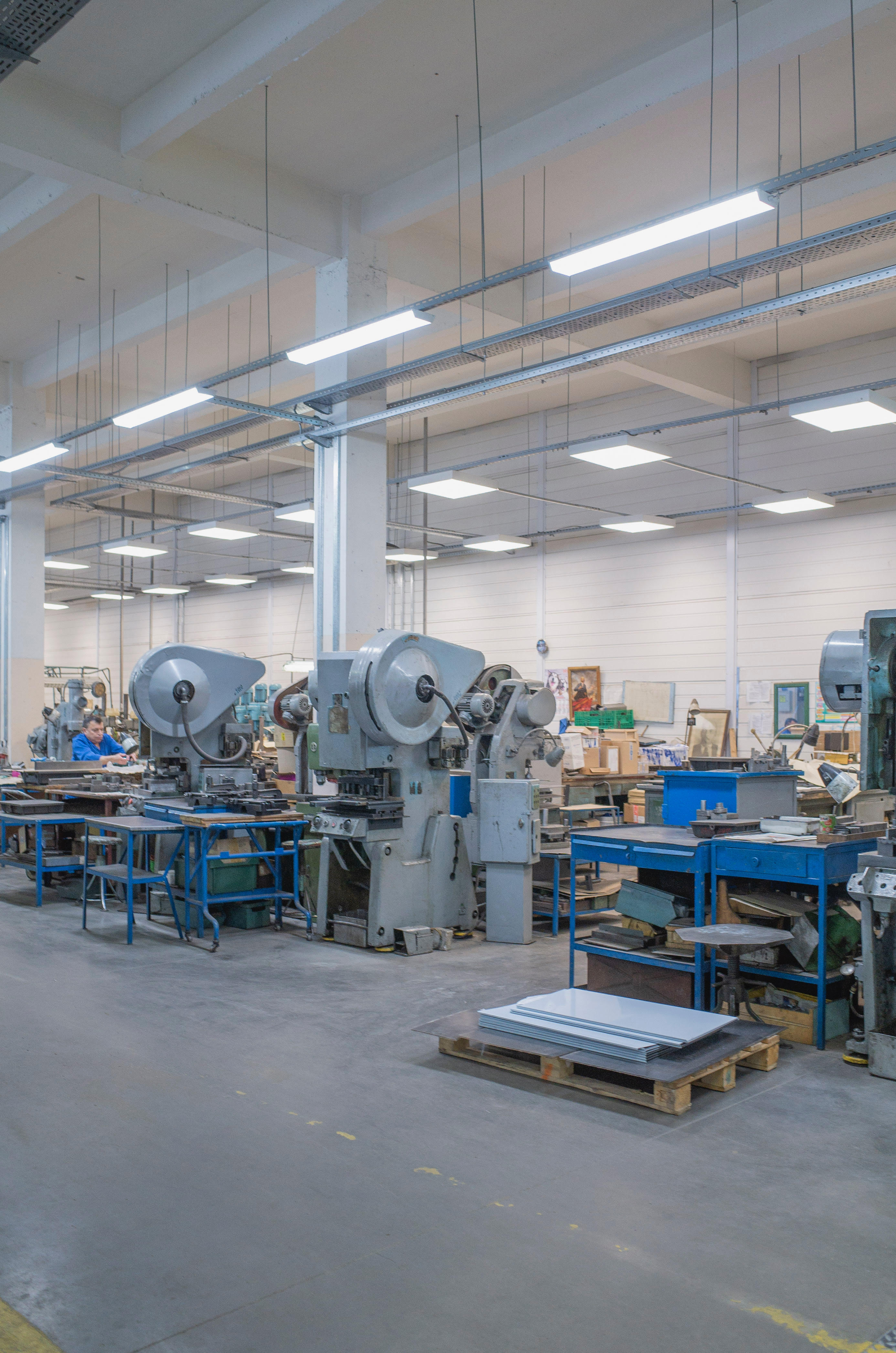 Фото: Олег Шатров